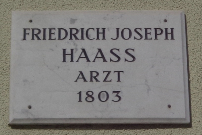 Göttinger Gedenktafel für Friedrich Joseph Haass (Weender Straße 31)